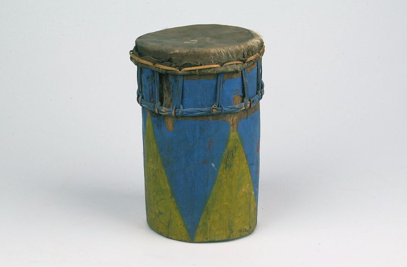 Slaginstrument. Enkelvellige cilindrische trom Unknown language: Dogdog